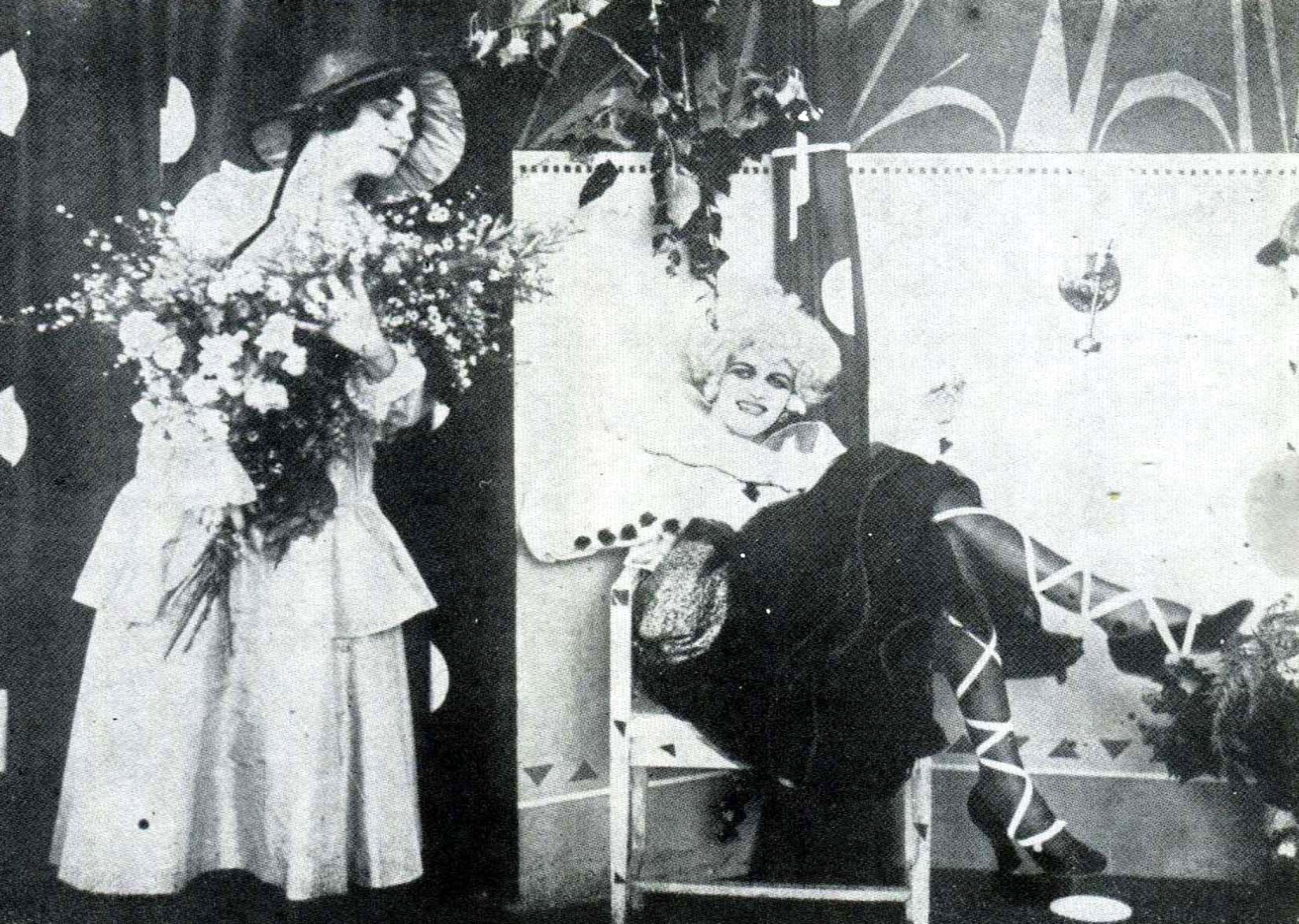 Foto di scena di Thaïs, regia di Anton Giulio Bragaglia e Riccardo Cassano, produz. "Novissima Film" - Roma 1917